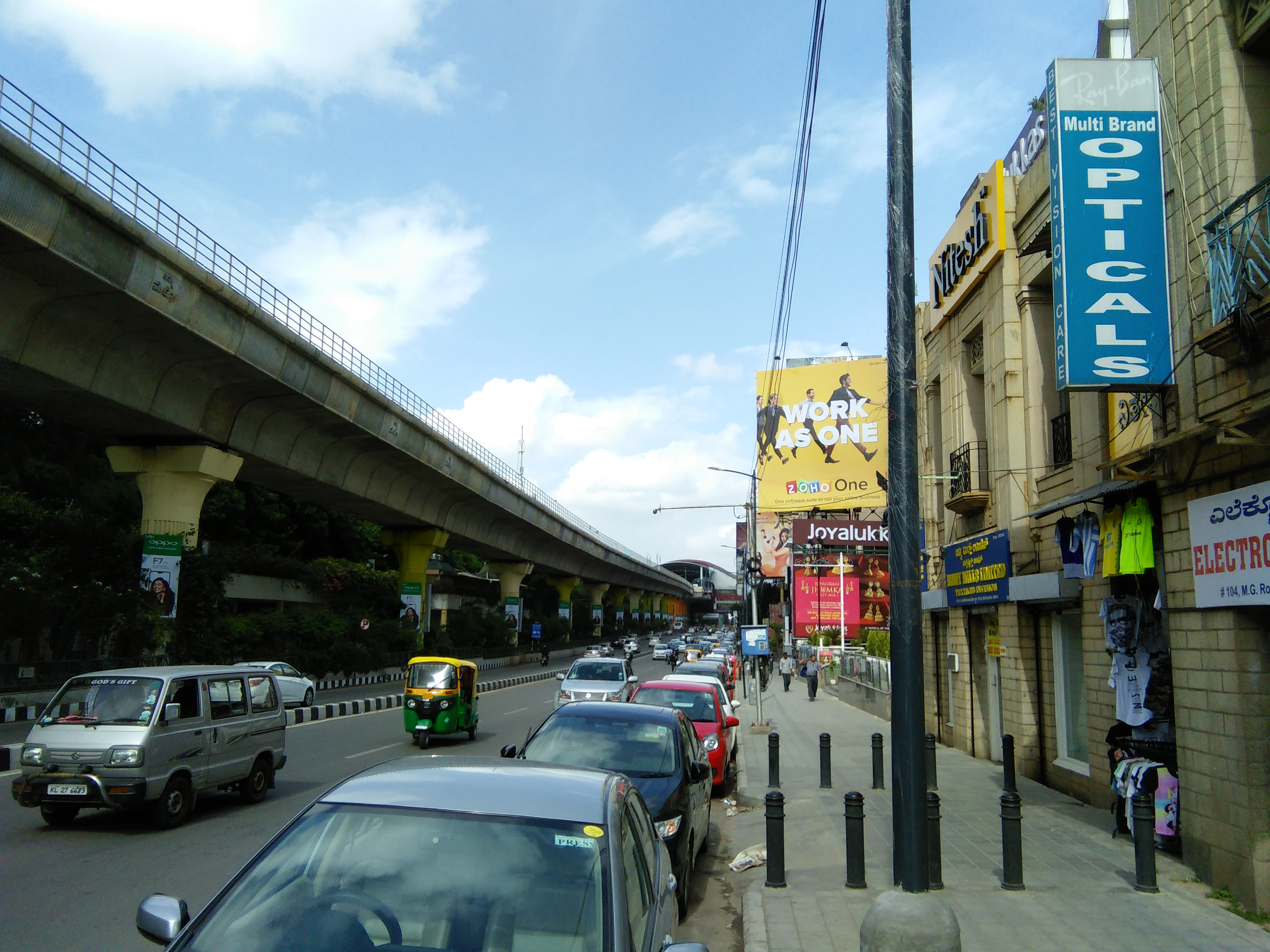 View of M. G. Road, Bangalore, Karnataka, India